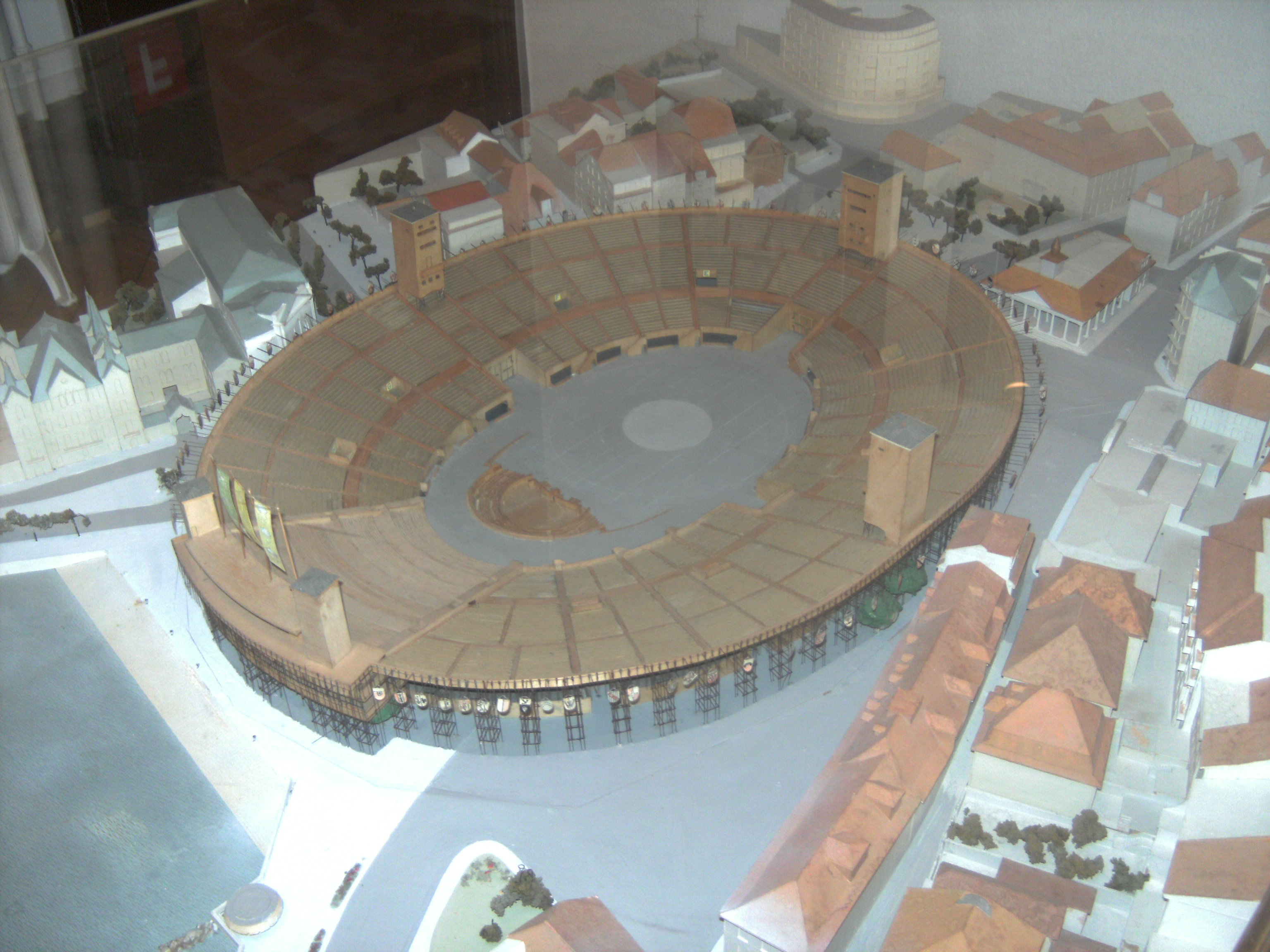 Vevey - fête des Vignerons - maquette de l'amphithéâtre de 1955 - exposée au musée historique de Vevey